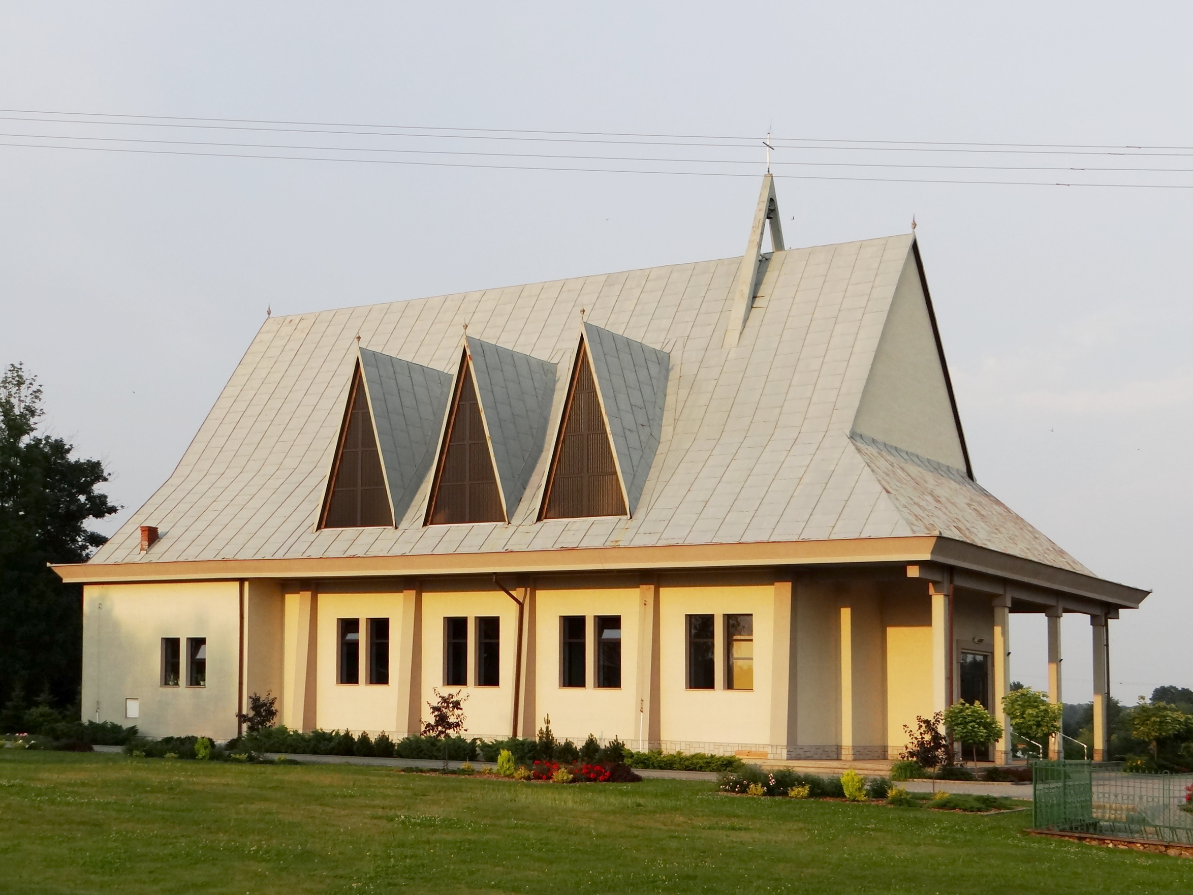 Zdjęcie wykonane w miejscowości Jata, powiat niżański.